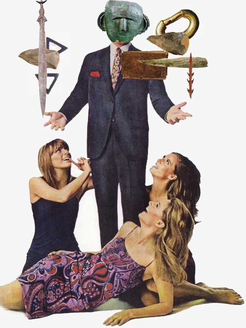 Chenard Walcker, 2003